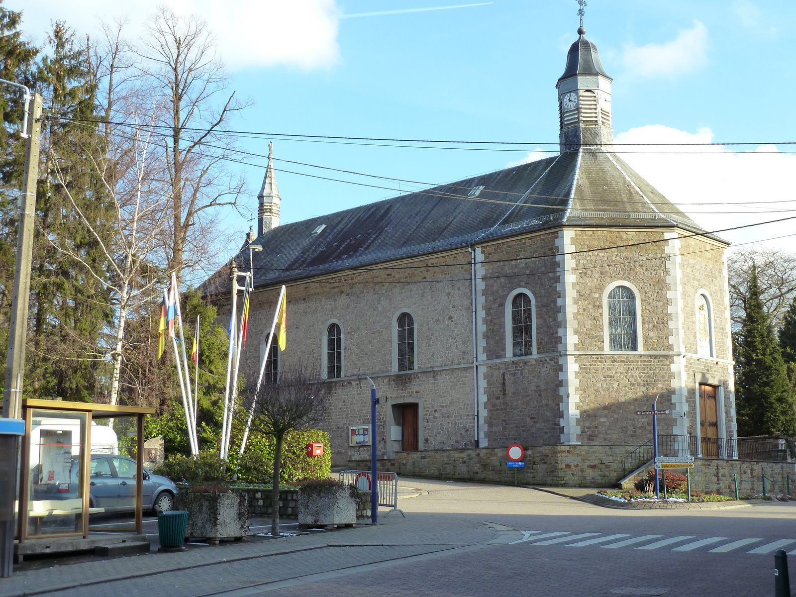 Wallfahrtskirche Moresnet